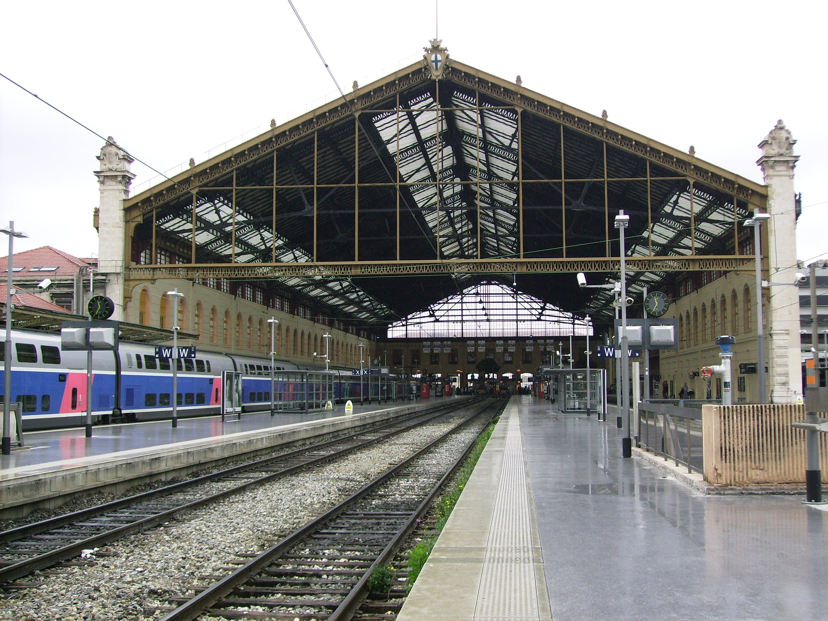 Gare de Marseille (France)